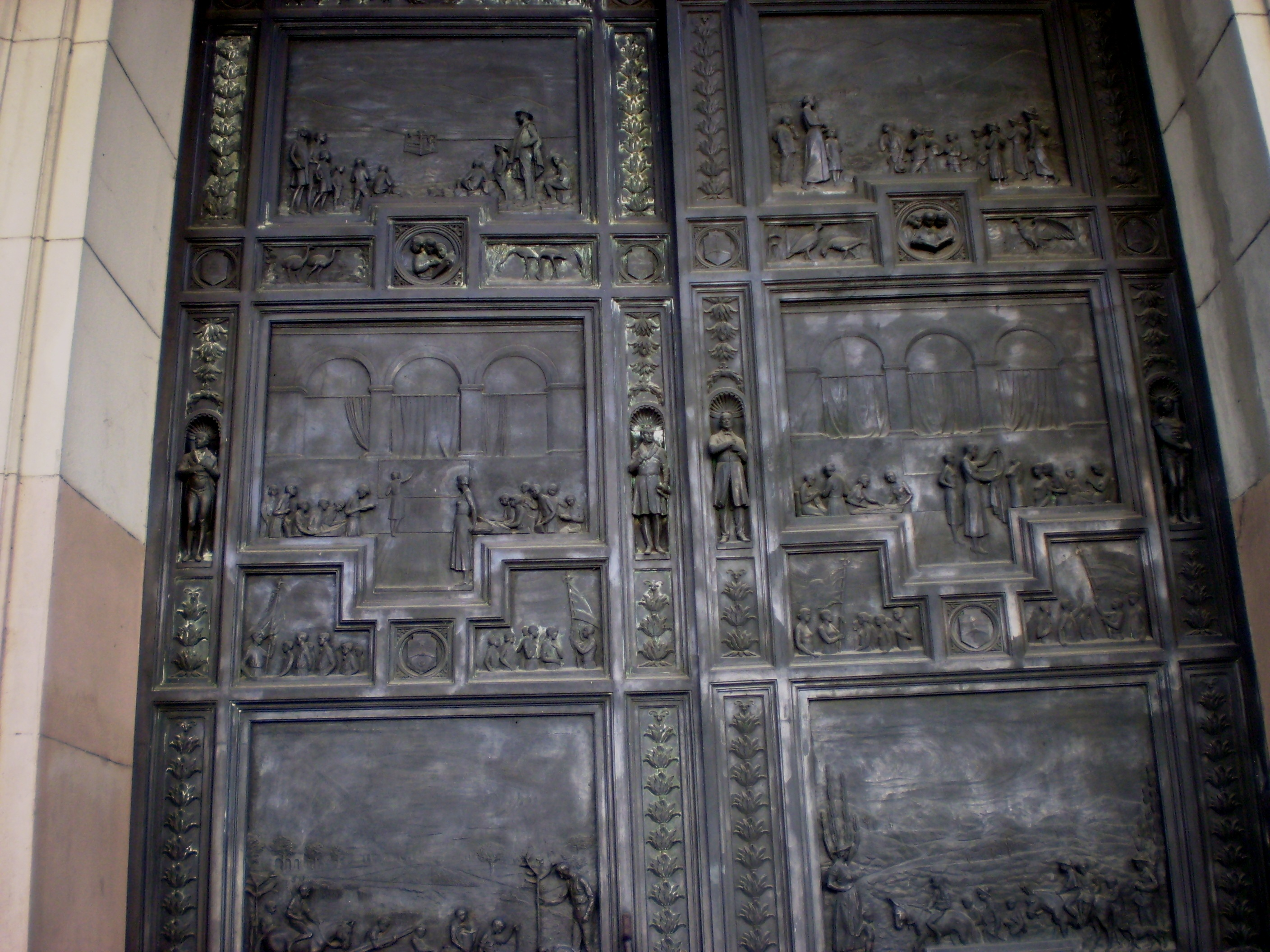 Detalle del portal, obra de Arturo Dresco.